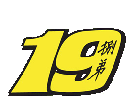 Startnumnmer Álvaro Bautista 2013